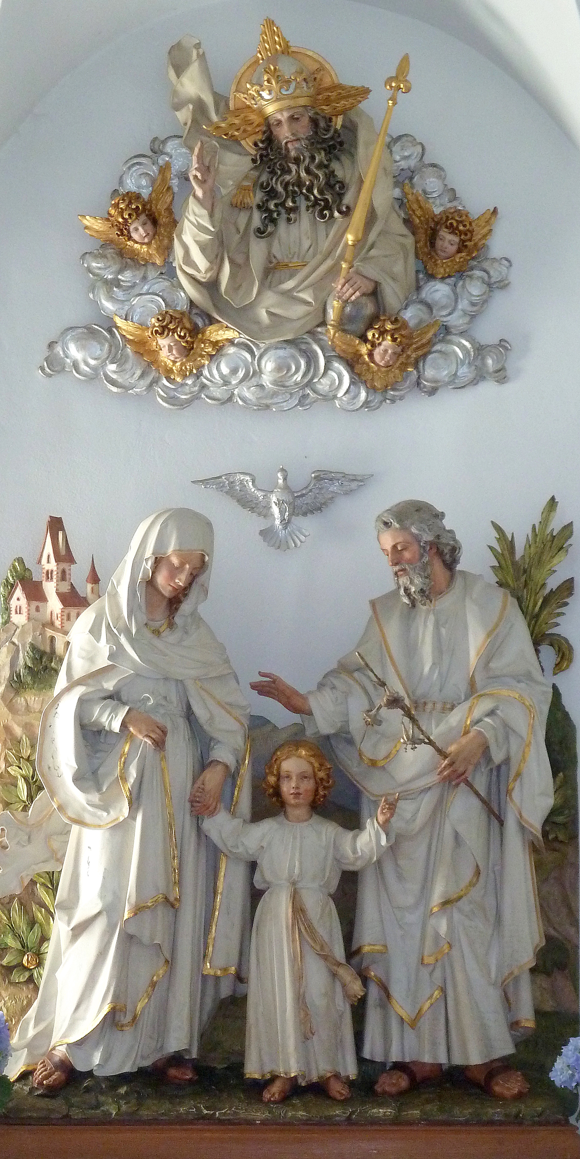 Die Heilige Familie mit Jesus, Maria und Josef, überhöht durch Gottvater und die Heilig-Geist-Taube. Rest von hölzernem Relief-Altar aus der Werkstatt Franz Josef Simmler, Offenburg (Anfang 20. Jahrhundert), in der St. Josefskapelle des Benediktinerklosters Mariastein, Schweiz.